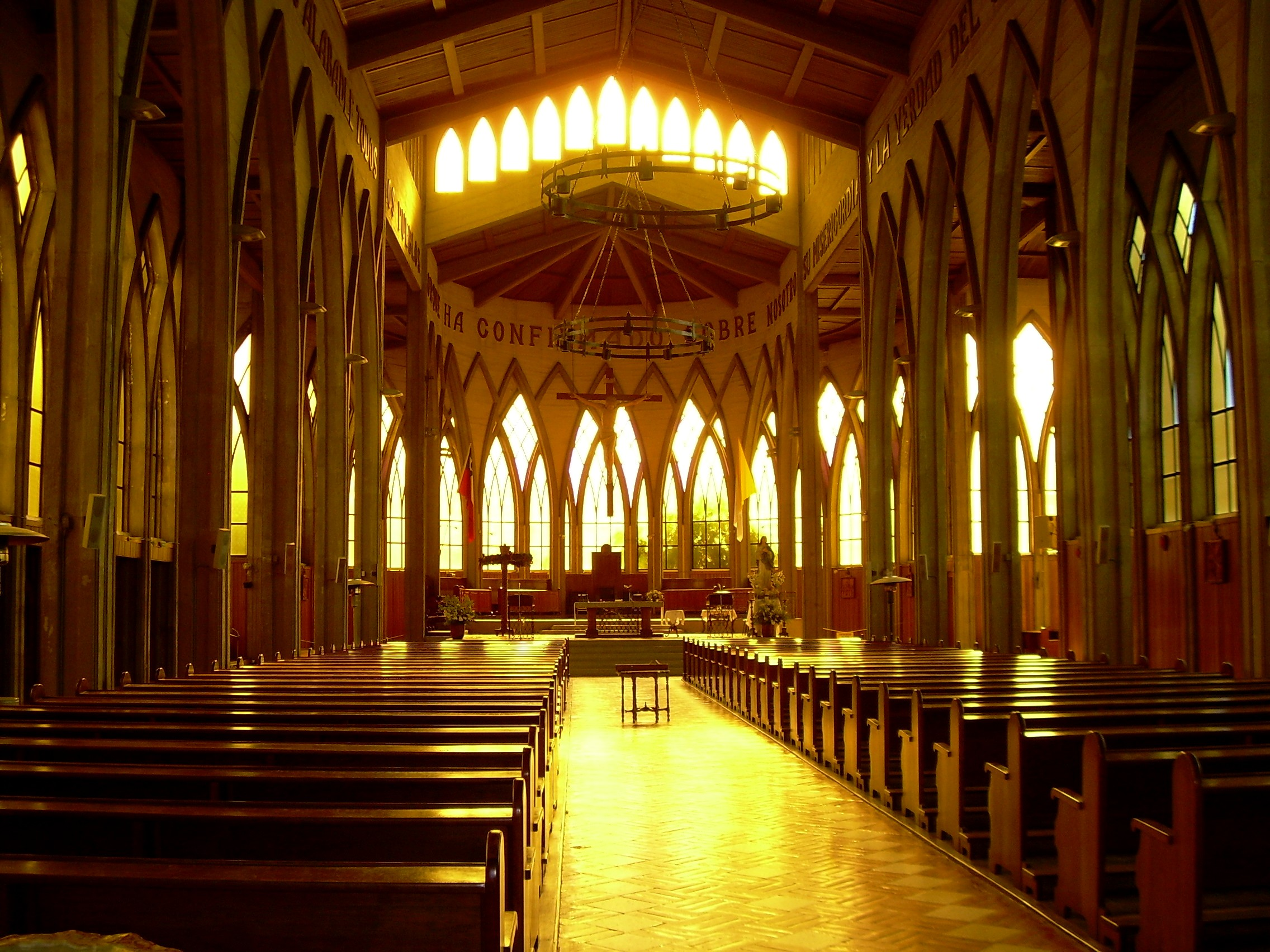 Catedral_de_Osorno_CHILE.jpg